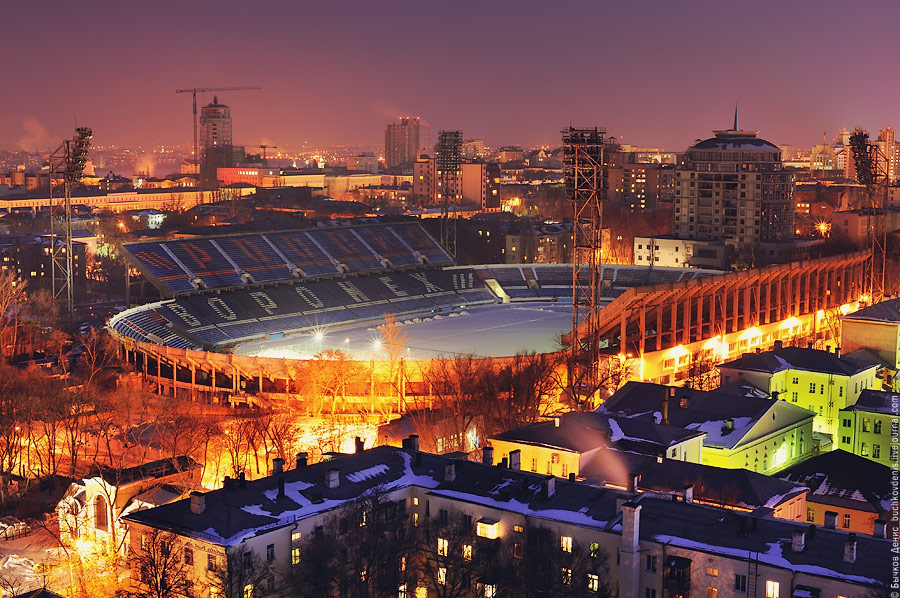 Центральный стадион профсоюзов (Воронеж) ночью